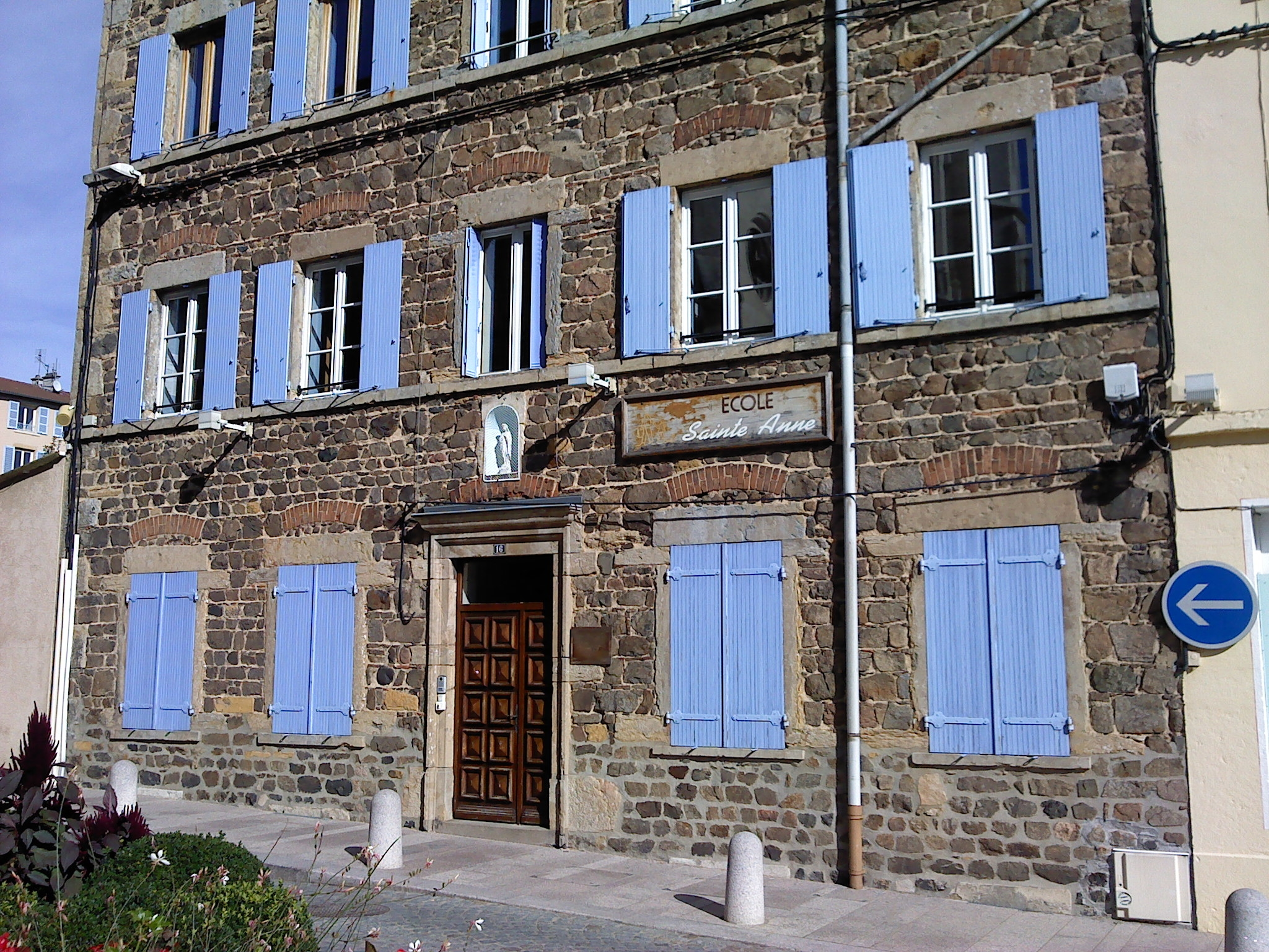 école privée Saint Anne de Pontcharra sur Turdine (Rhône)